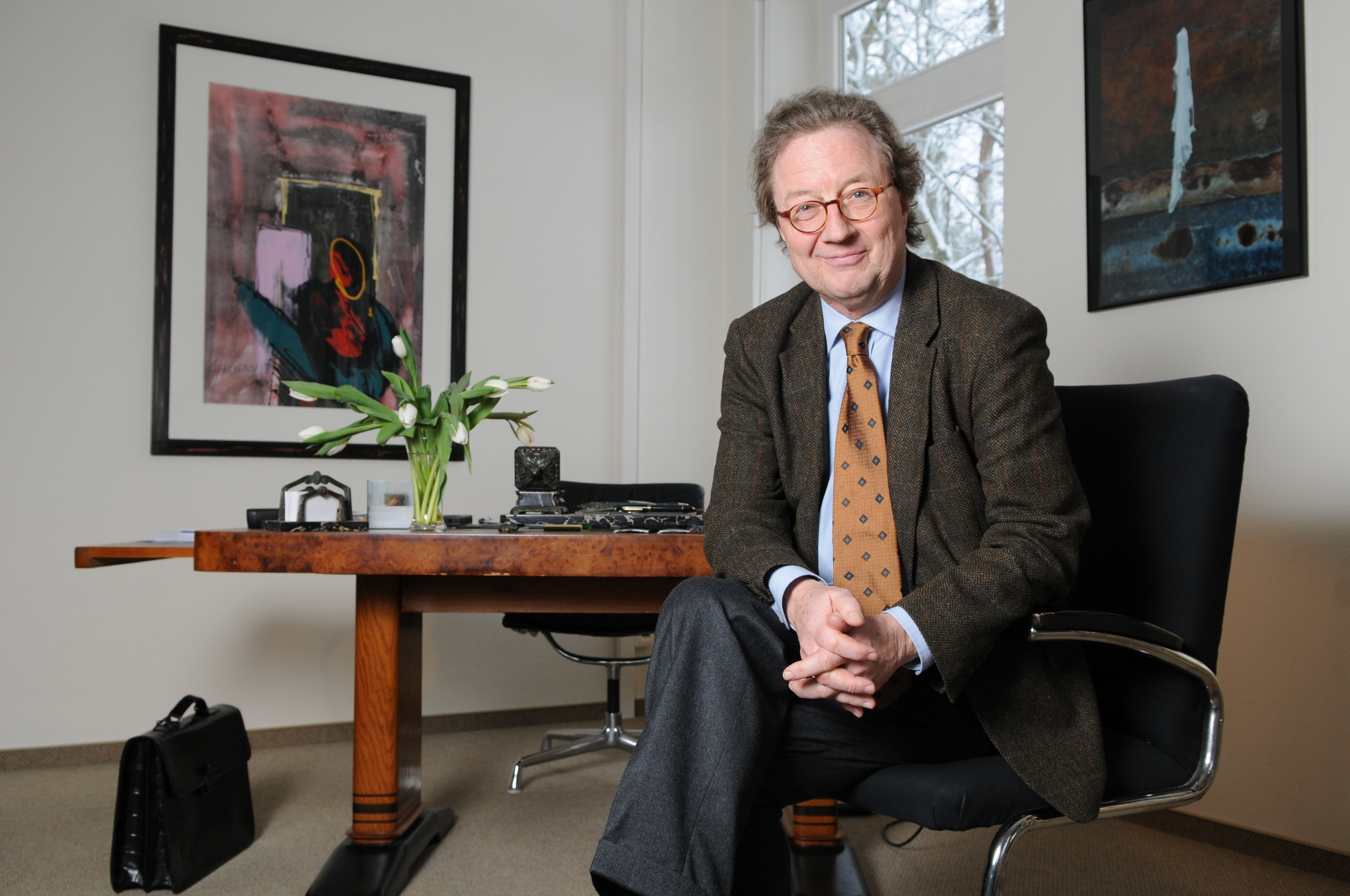 Prof. Dr. Dr. Stephan Ahrens ist ärztlicher Direktor des Fachzentrums für Stressmedizin und Psychotherapie mit drei Standorten in Hamburg.